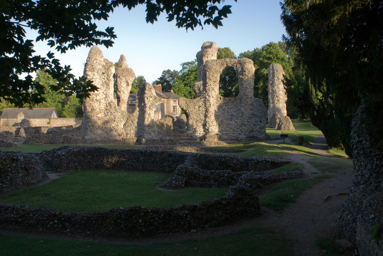 Abbey Gardens Bury St Edmunds Suffolk